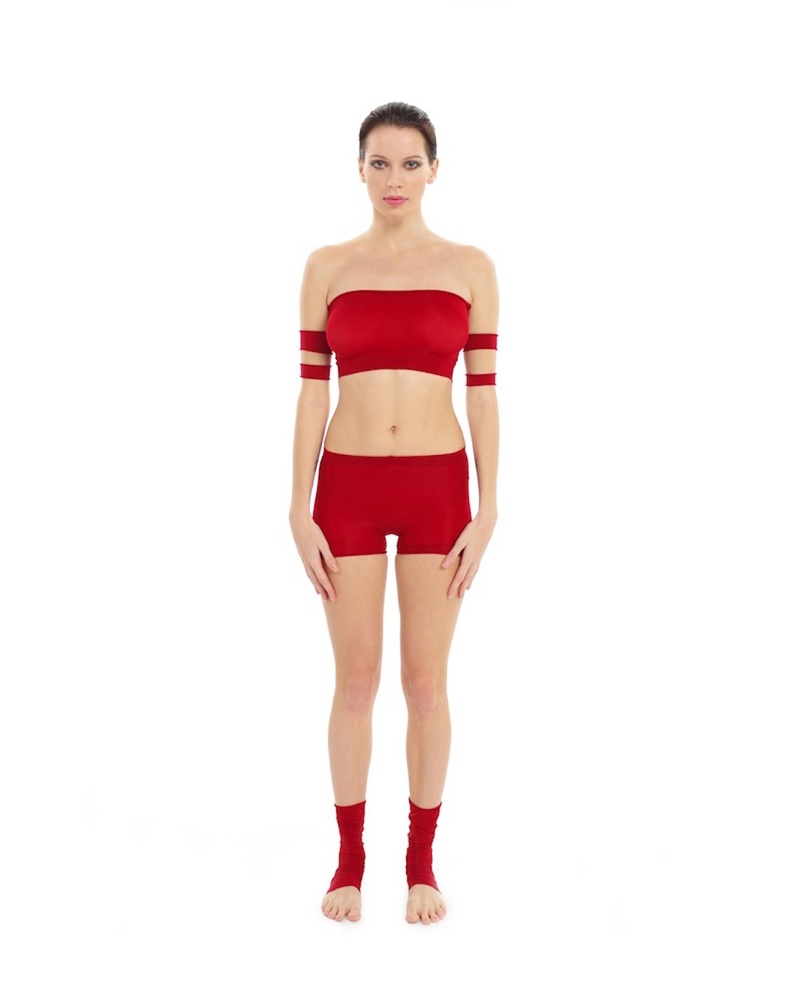 Tadasana by Nina Mel, Yoga Teacher